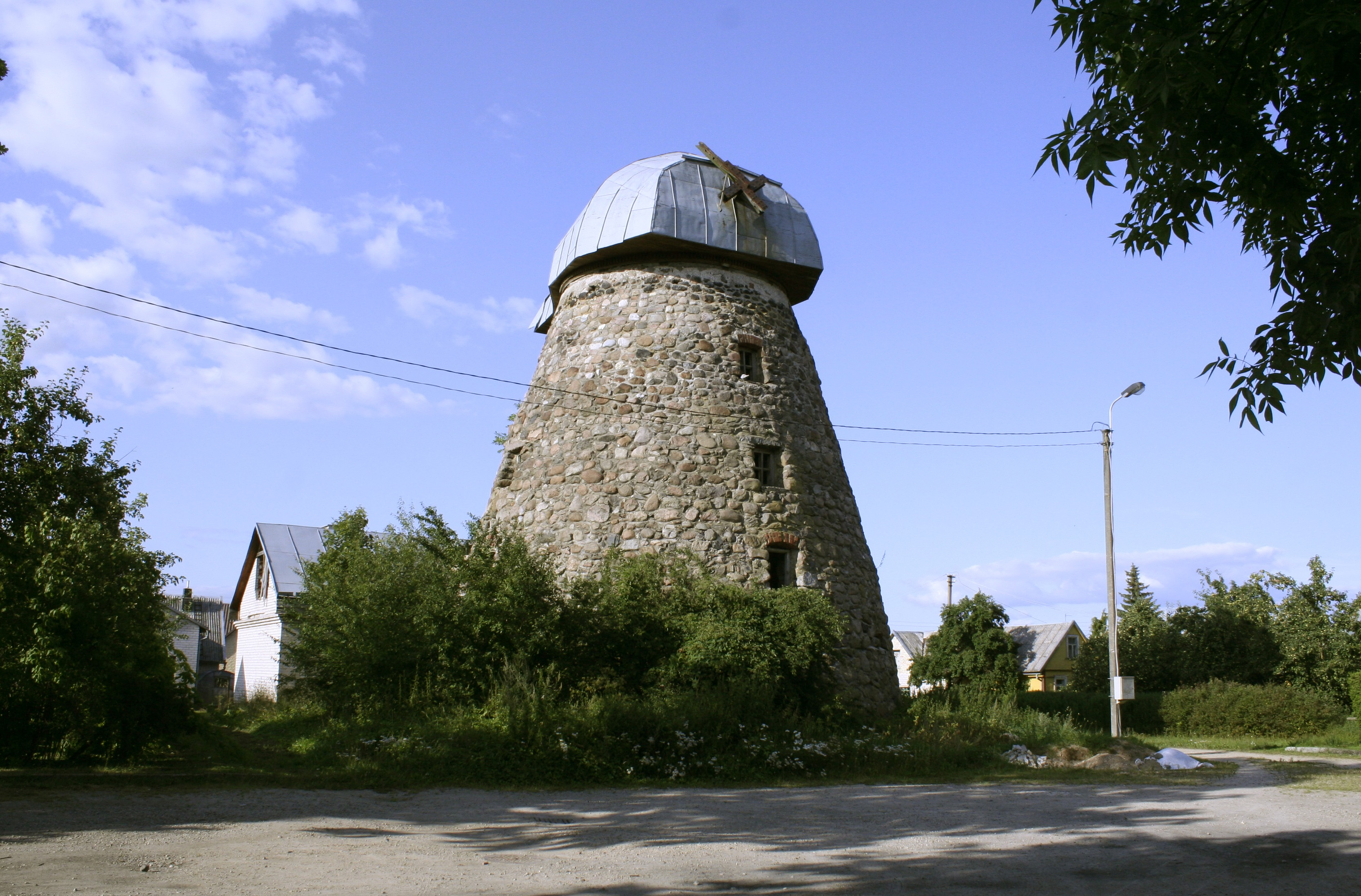 Vėjo malūnas Kupiškyje